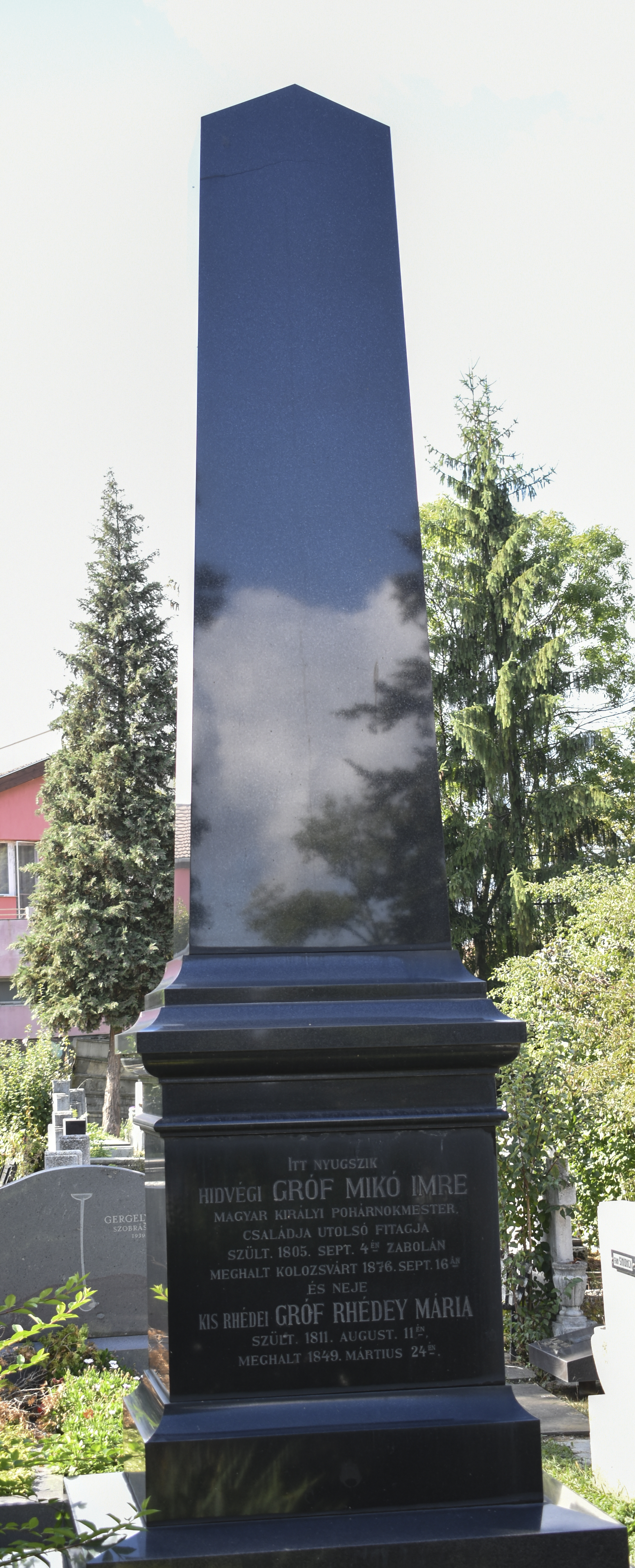 Mormânt conte Mikó Imre (1805-1876) 189